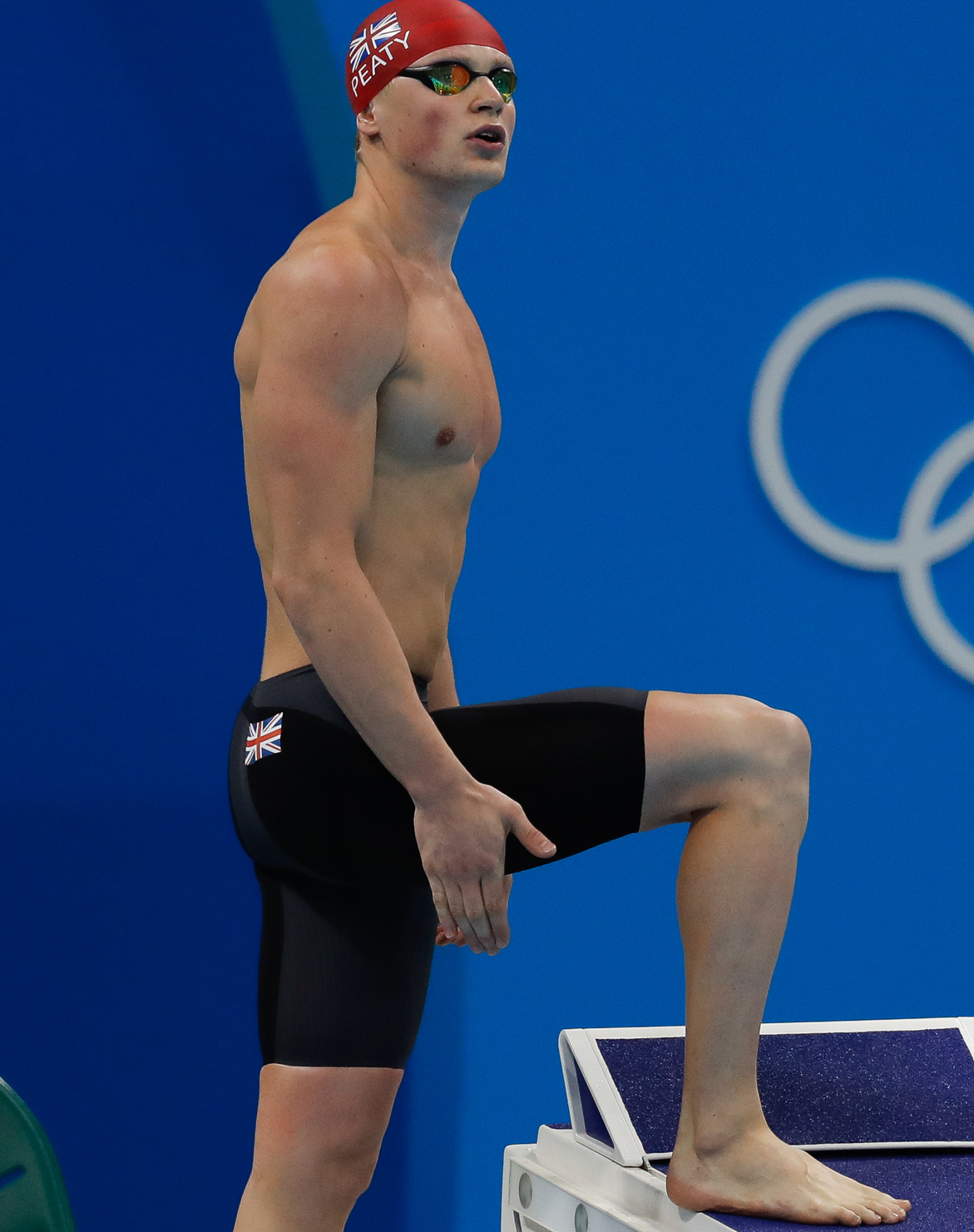 Rio de Janeiro - Nadadora norte-americana Katie Ledecky bate recorde mundial e leva medalha de ouro nos 400m livre nos Jogos Olímpicos Rio 2016 (Fernando Frazão/Agência Brasil)